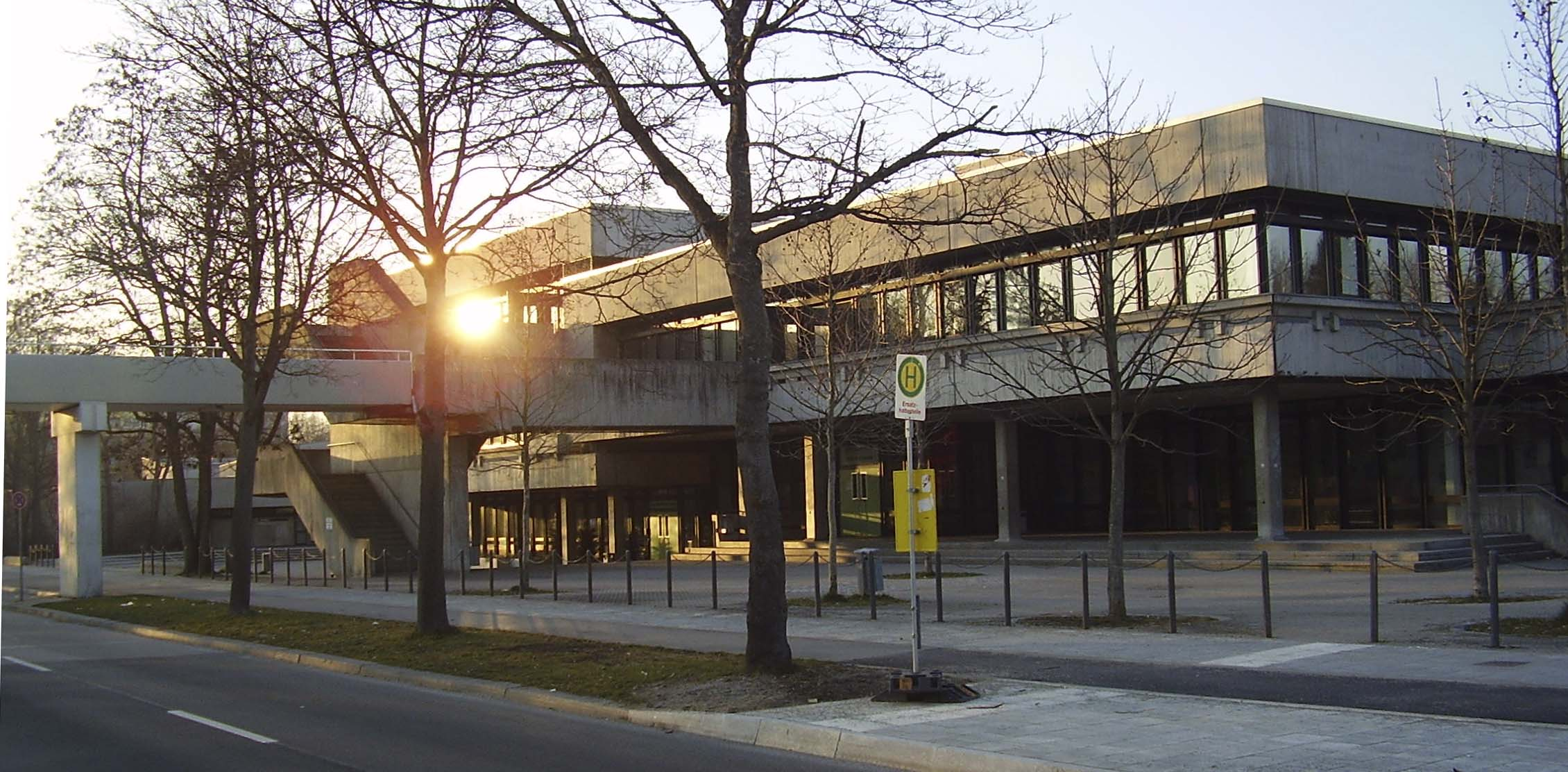 Schulzentrum Perlach-Nord mit dem Werner-von-Siemens-Gymnasium und der Werner-von-Siemens-Realschule in München (Munich / Germany)